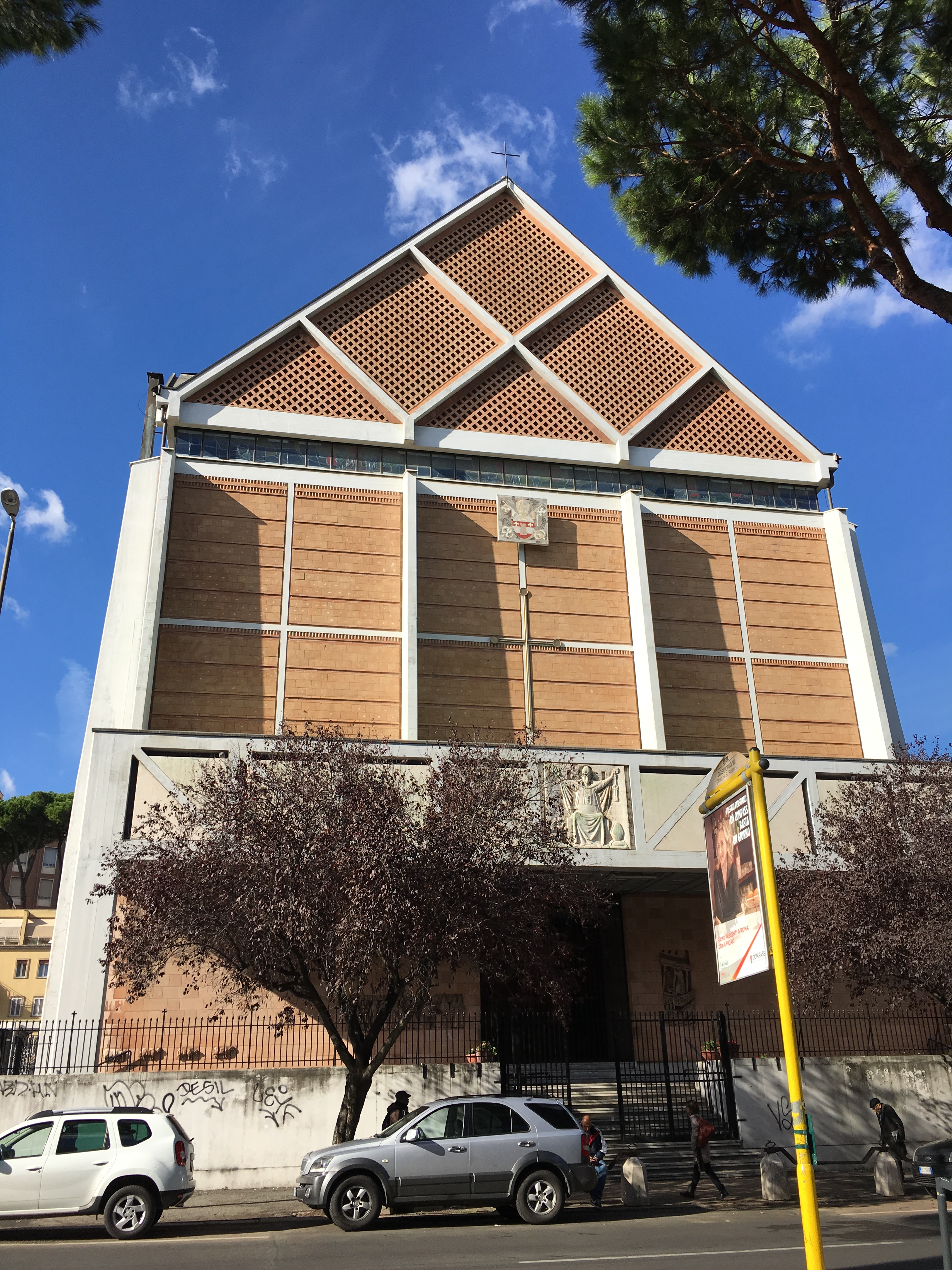 Facciata della chiesa di San Gregorio VII